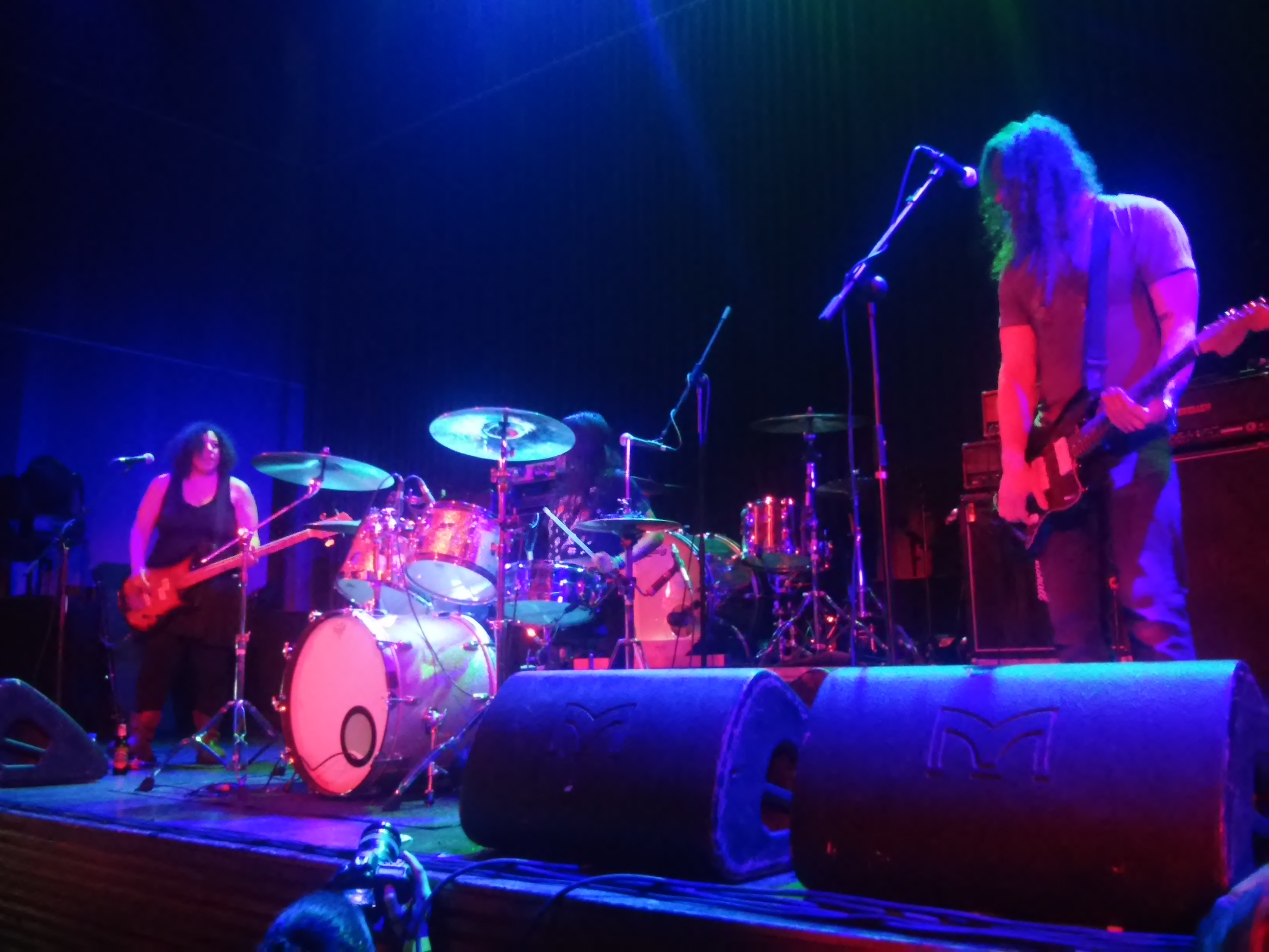 A banda de Seattle Helms Alee actuando na Sala Capitol de Santiago de Compostela.